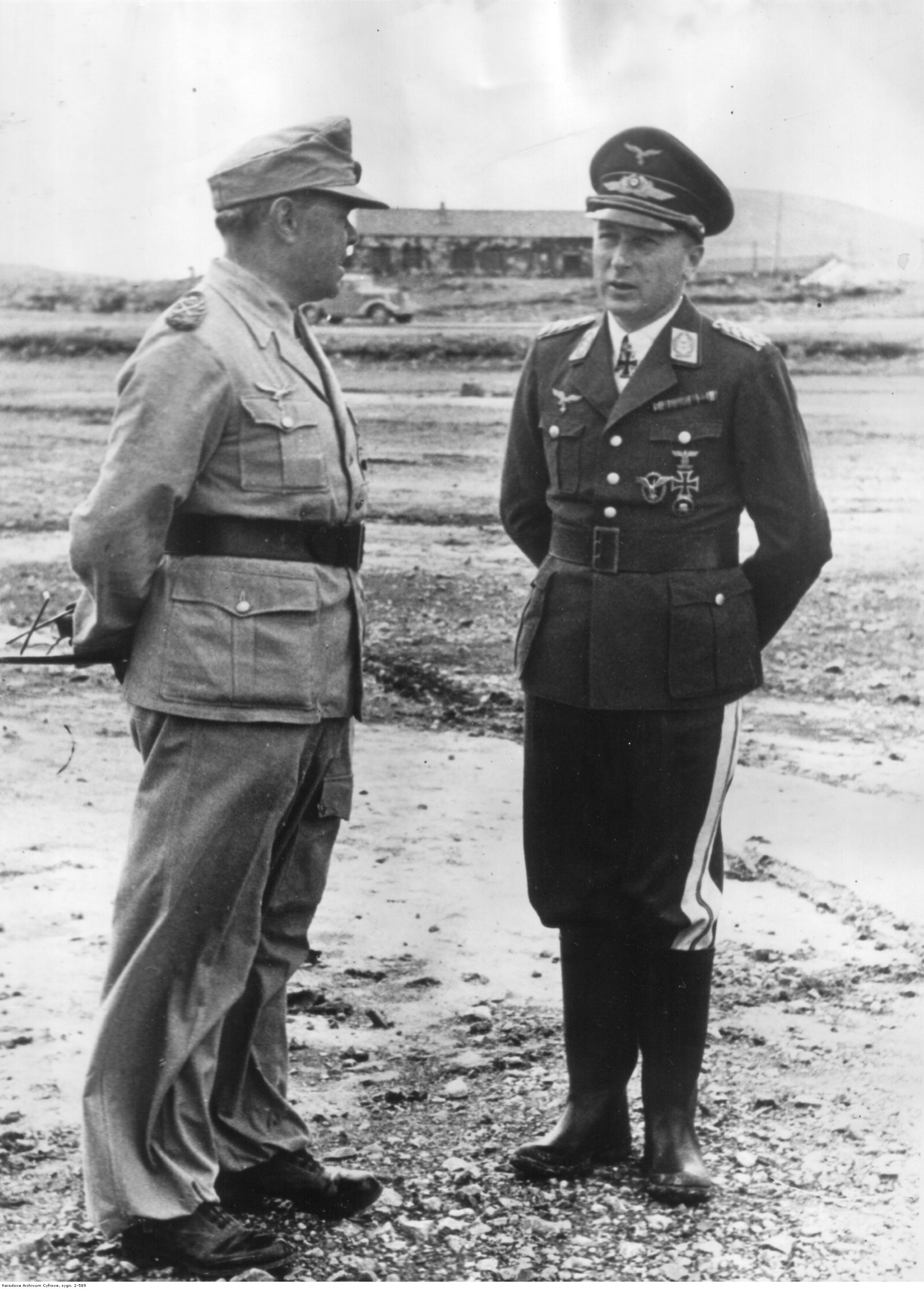 Marszałek Albert Kesselring (z lewej) w rozmowie z gen. Otto Hoffmannem von Waldau na lotnisku na Krecie.